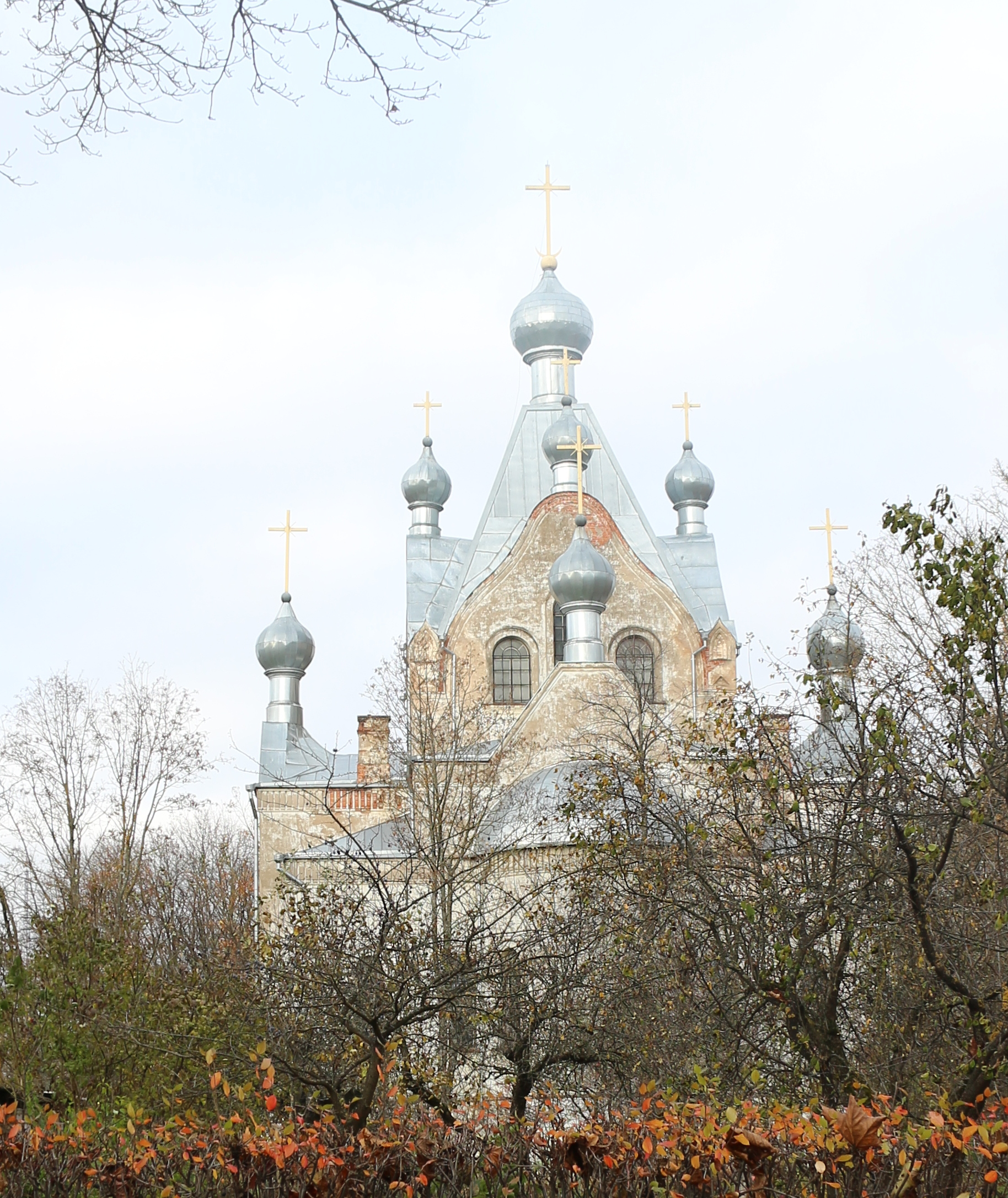 Kiriku hoone